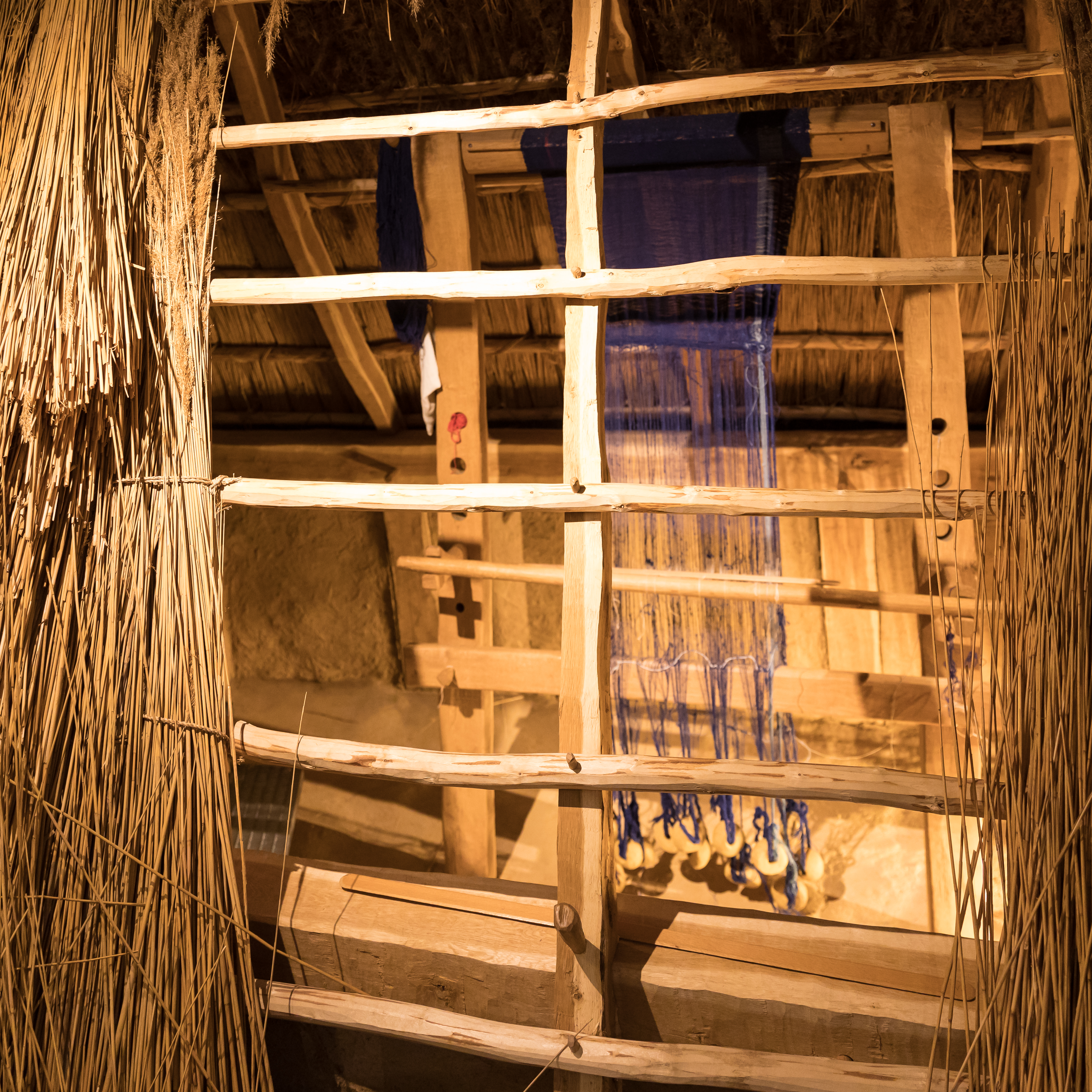 Alamannenmuseum Ellwangen - Innenansichten Foto: Rekonstruierte alamannische Webhütte (Grubenhaus) mit einem stehenden Webstuhl, auf dem ein blaues Leinengewebe zu sehen ist. Als Vorbild dienten Ausgrabungsbefunde aus der alamannischen Siedlung von Lauchheim-Mittelhofen.